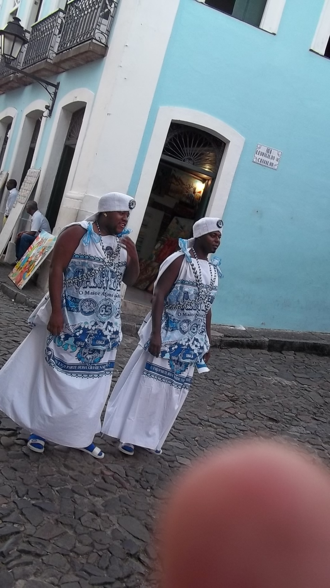 Integrantes del bloco carnavalesco Filhos de Gandhi en las calles de Salvador de Bahía.